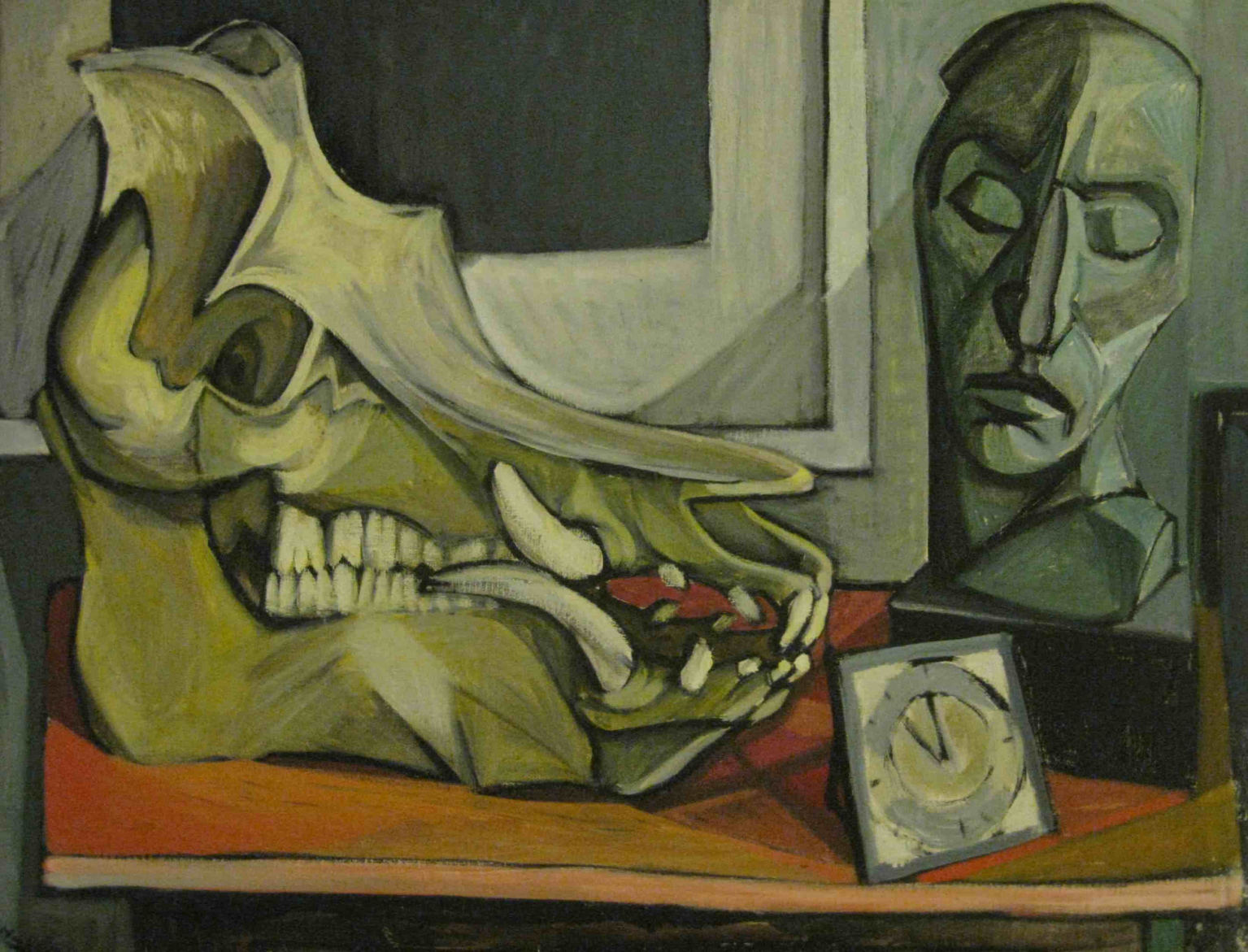 "Eberschädel, Plastik und Uhr", Stillleben von Hans Neubert (1959, Öl auf Leinwand)